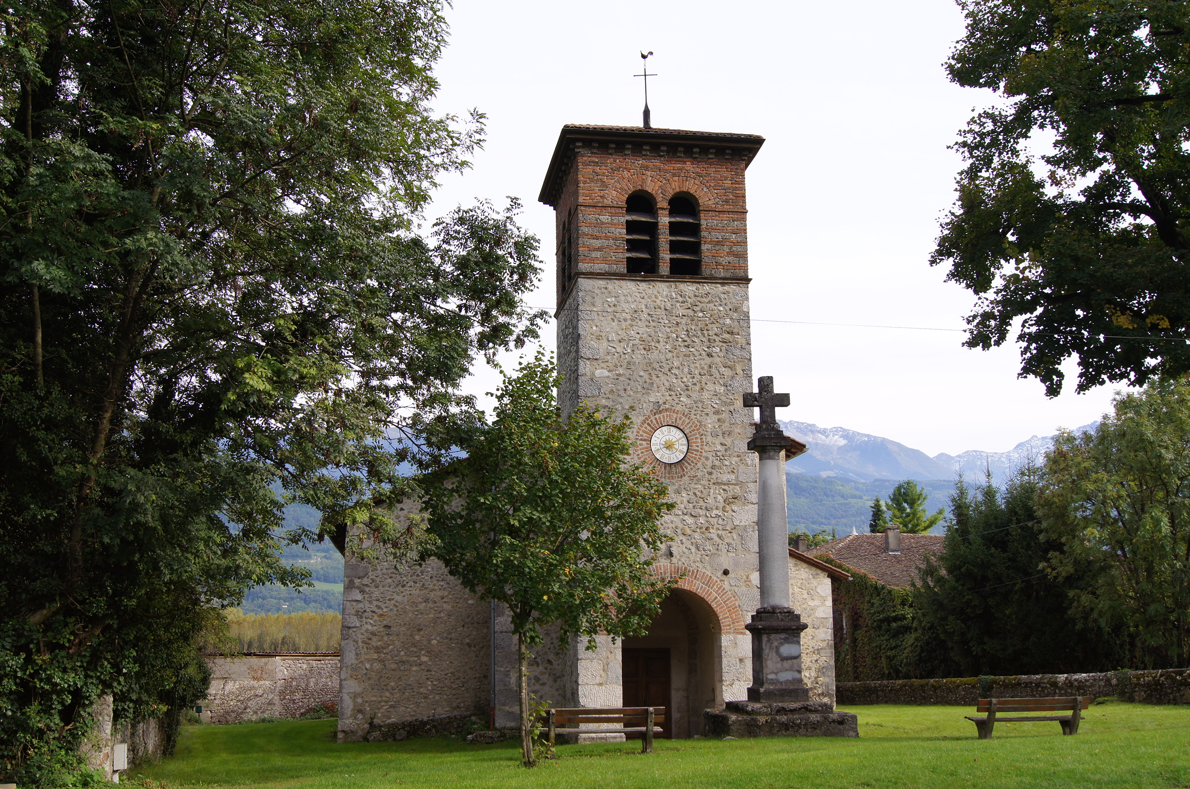 Eglise